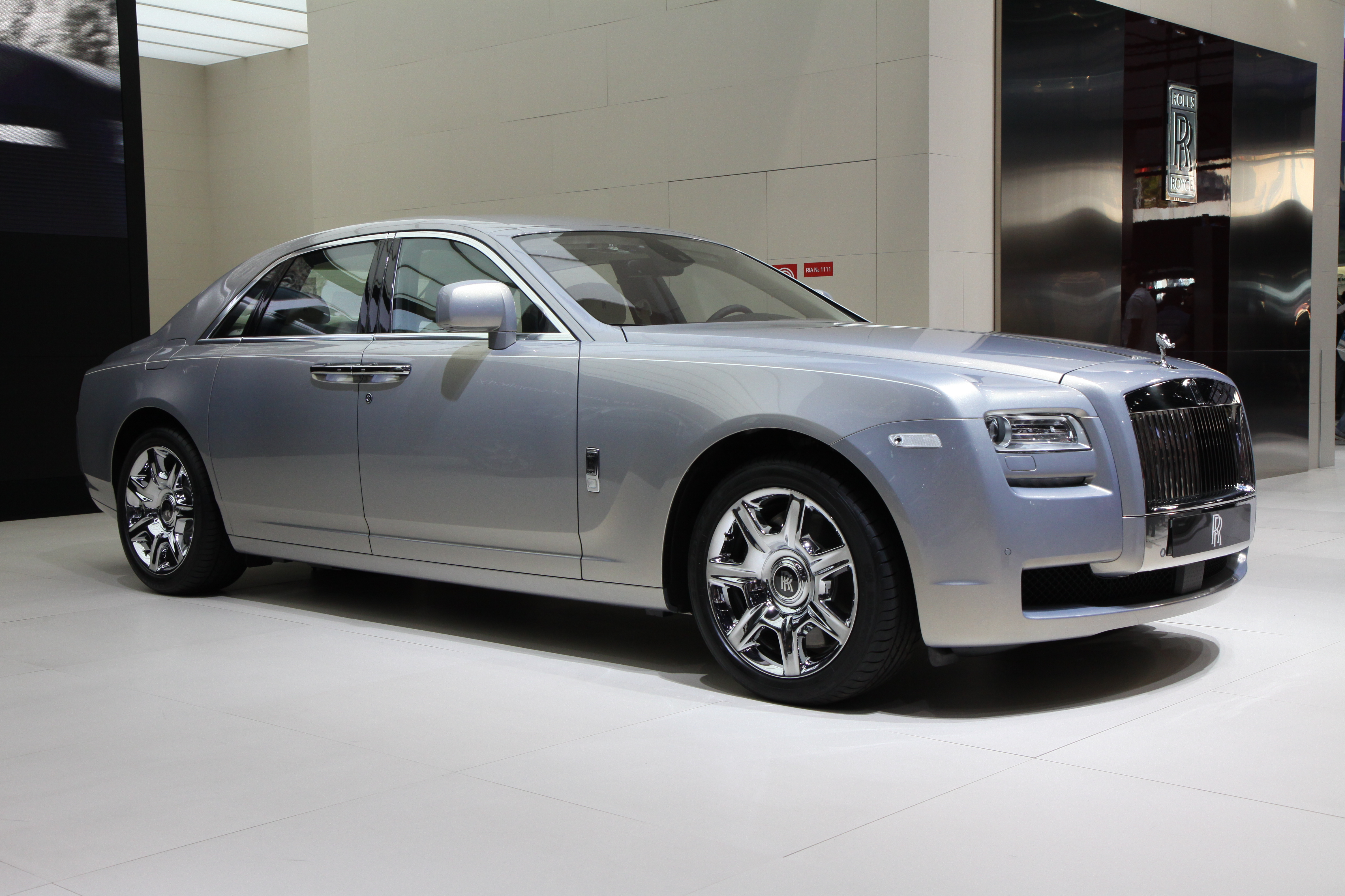 Une Rolls Royce Ghost au mondial de l'automobile de Paris en 2010.